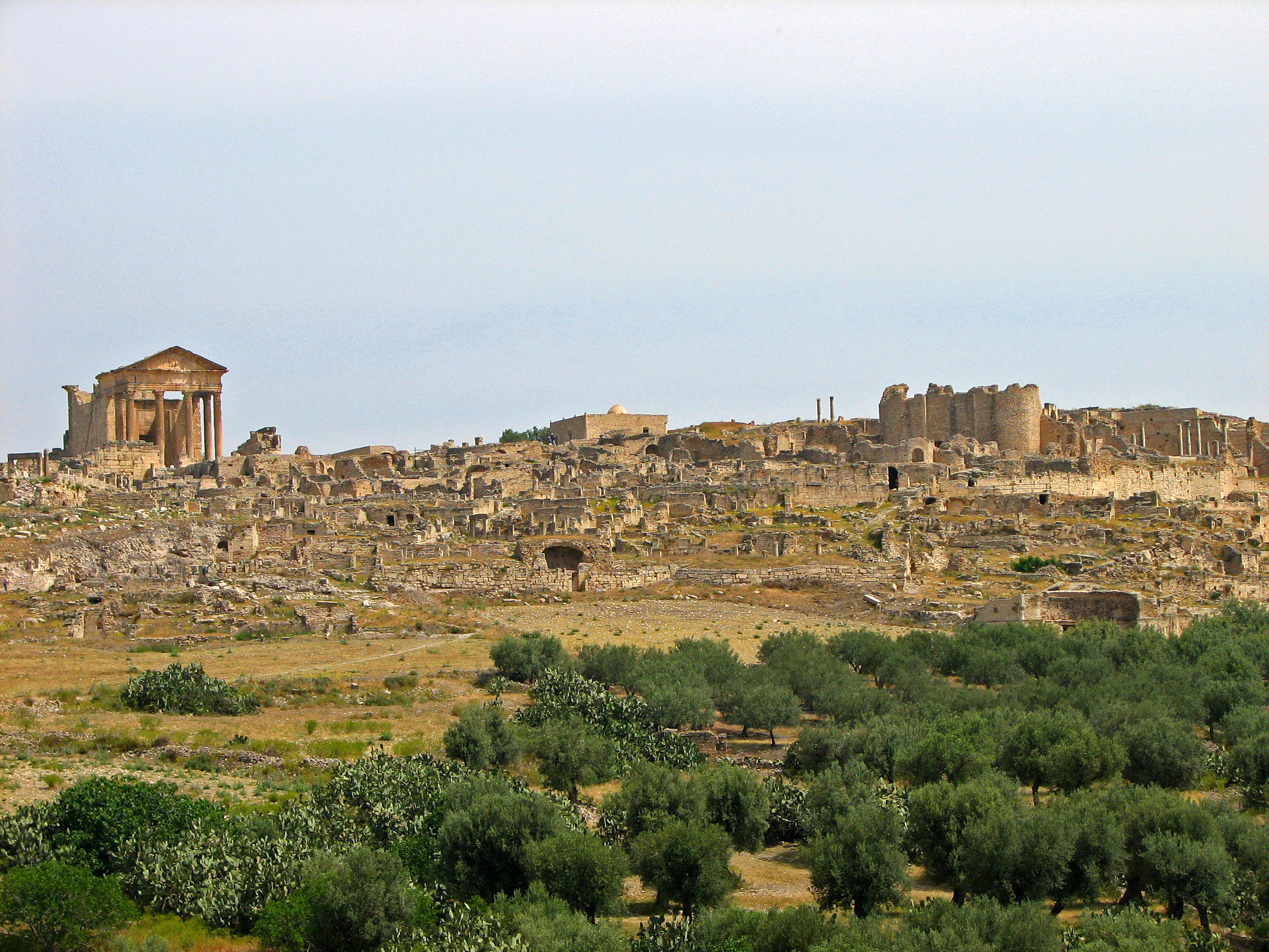 Teboursouk, Tunisia